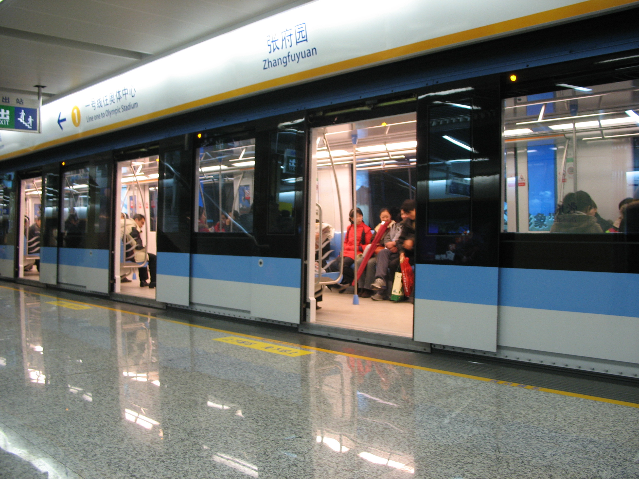 一列zh:南京地铁列车停靠在zh:张府园站 zh:2006年拍摄